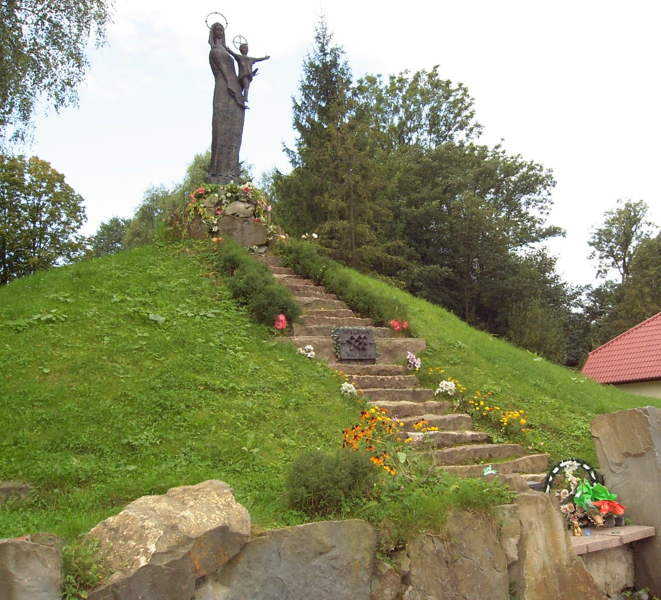 Трускавець пам'ятник